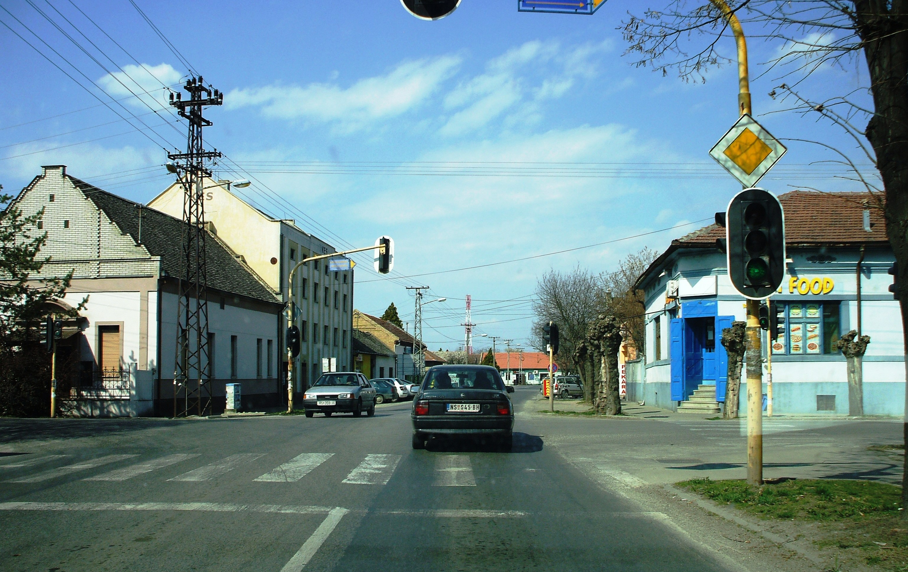 Главна улица у Бачком Петровцу